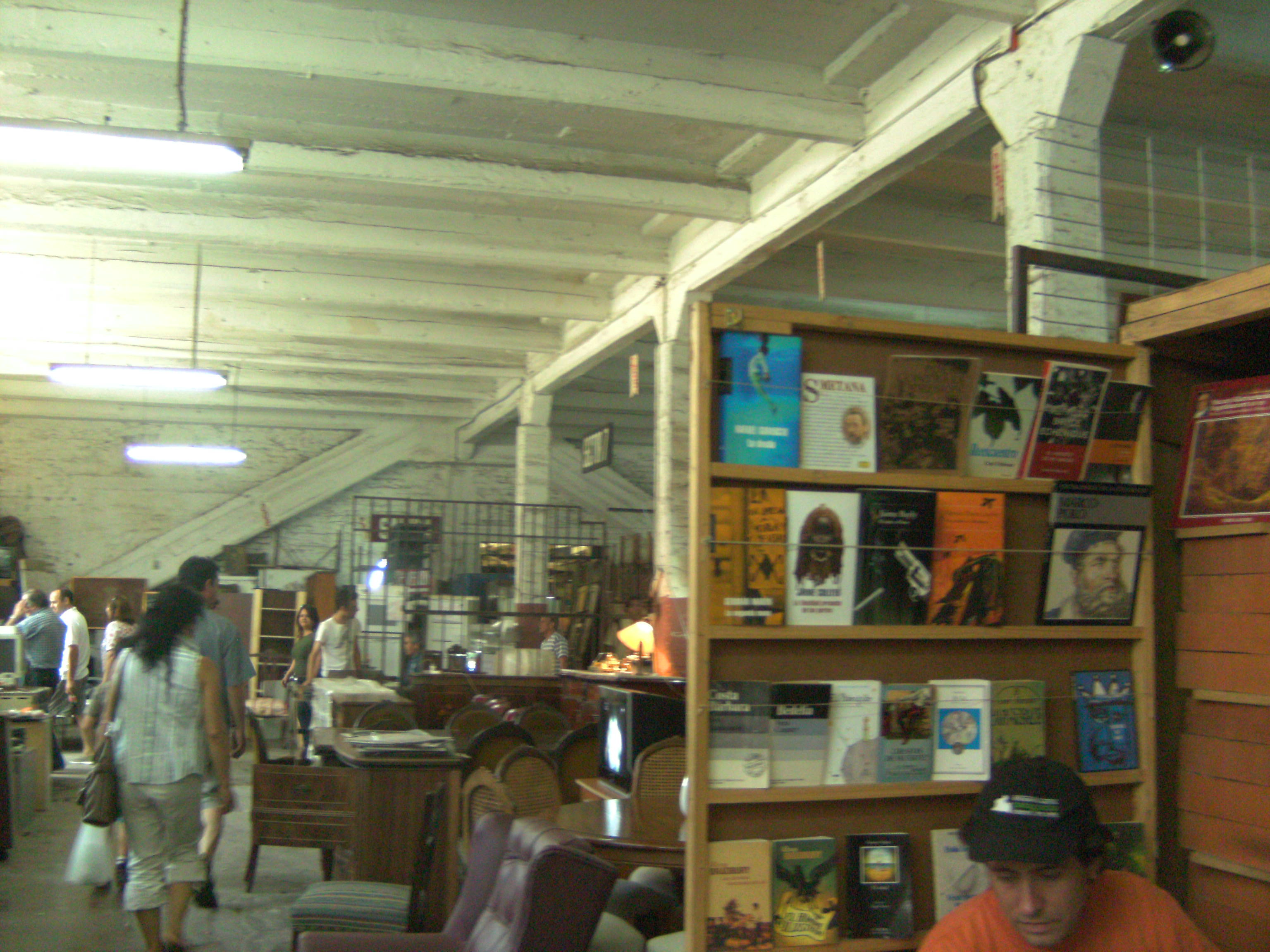 Antiguo galpón industrial transformado en la feria persa Biobío.